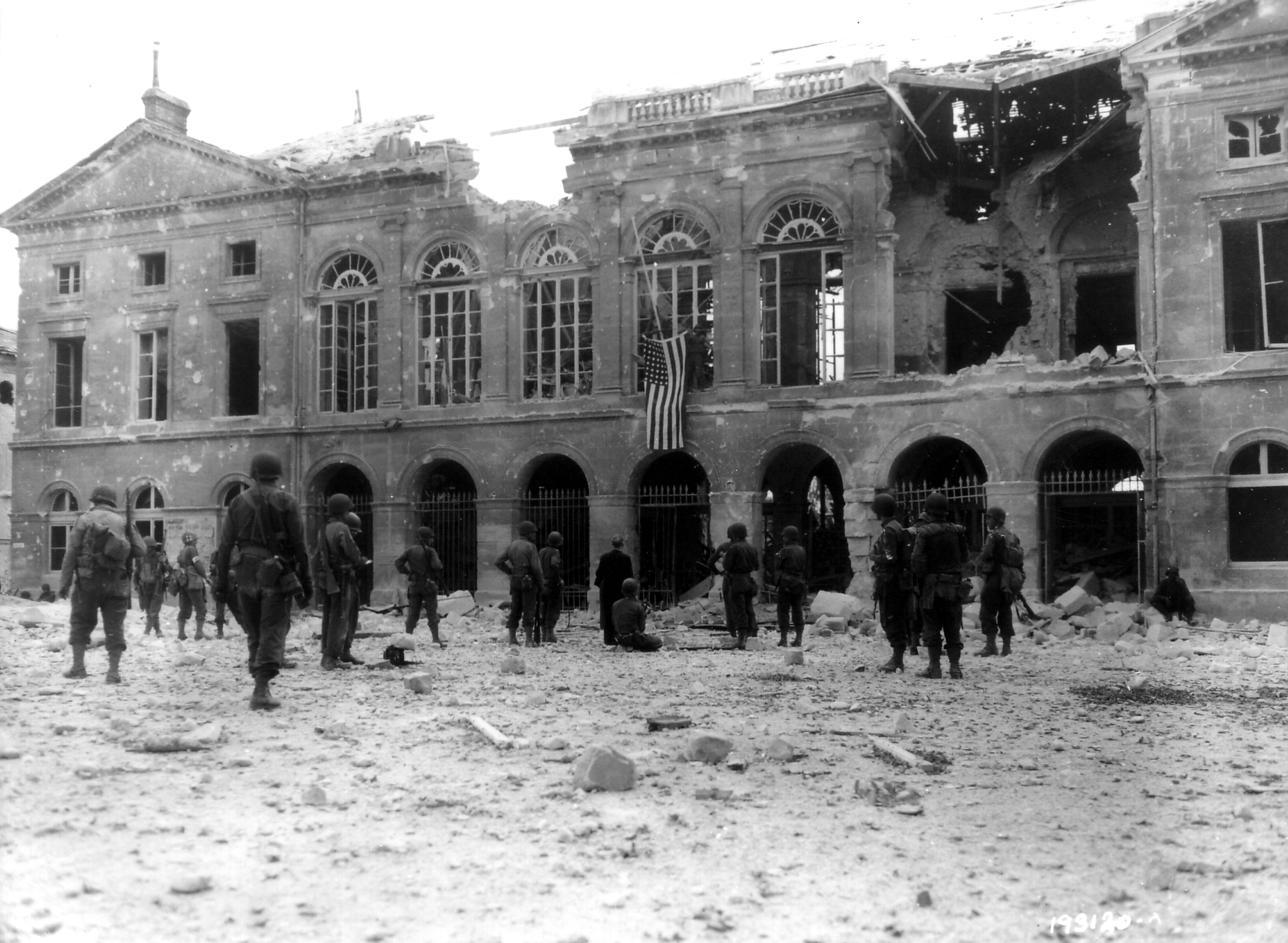 Le 20 août 1944, des GI'S viennent d'accrocher un drapeau américain sur la façade de l'hôtel de ville détruit, en présence du maire d'Argentan M. Yves Sylvestre et du colonel Harry D. Mac Hugh commandant du 318th Infantry Regiment de la 80th US Infantry Division. A gauche un medic, voir casque et brassard de la Croix-Rouge. Cette séquence a été filmée : voir au centre de la photo, un cameraman à genoux : voir la p000432 en gros plan: Quelques années plus tôt: et en 2010 : Pour aller plus loin